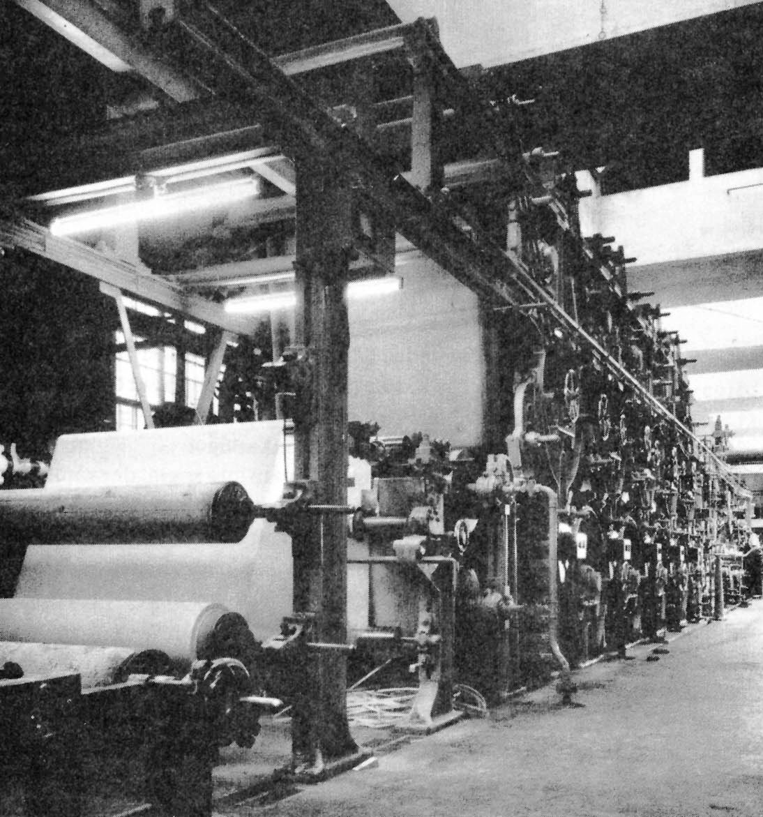 Pappersmasin i Tumba bruk från 1940-talet